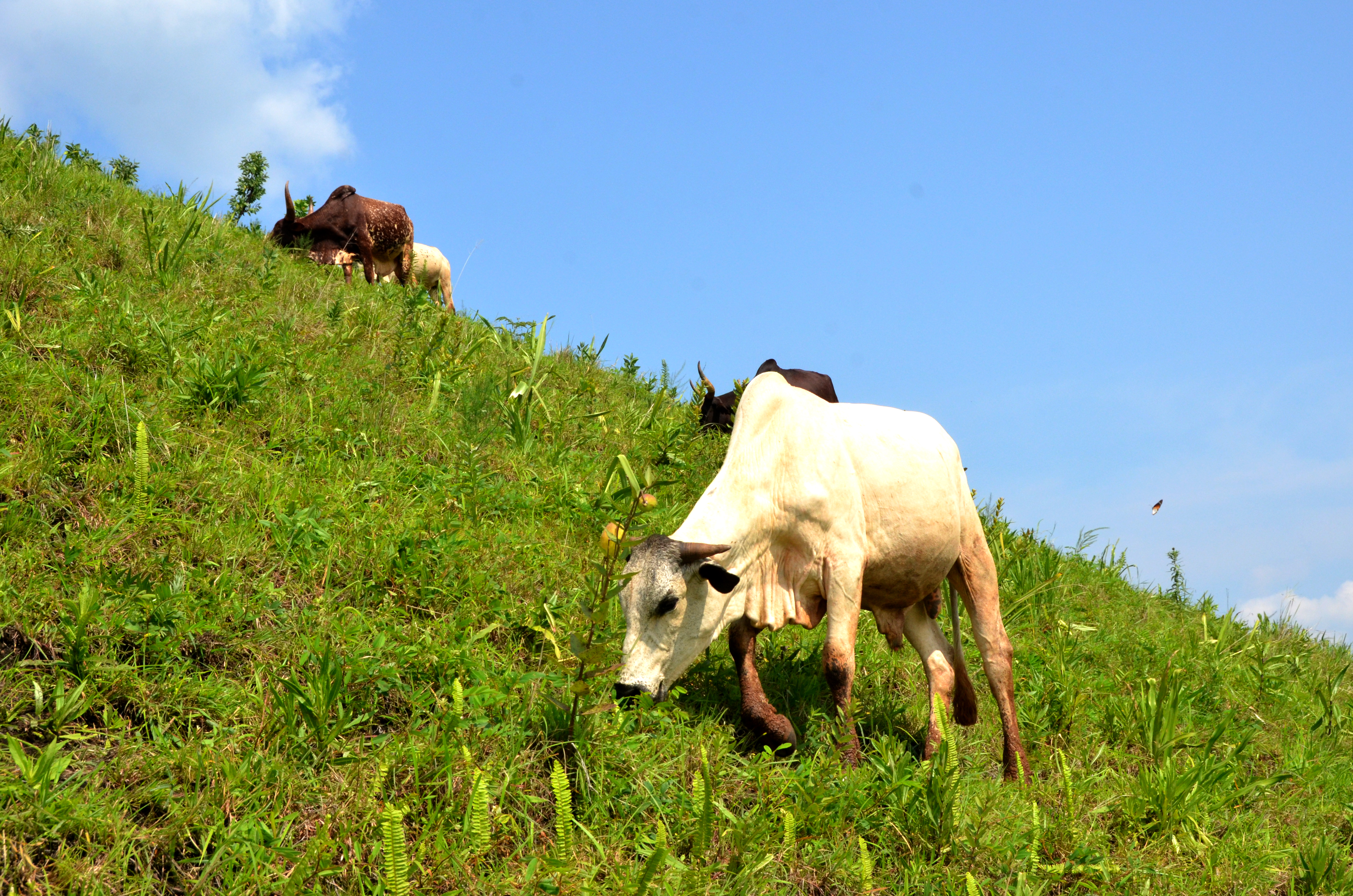 Le lac Petpenoun dans le Noun, dans la région de l'Ouest